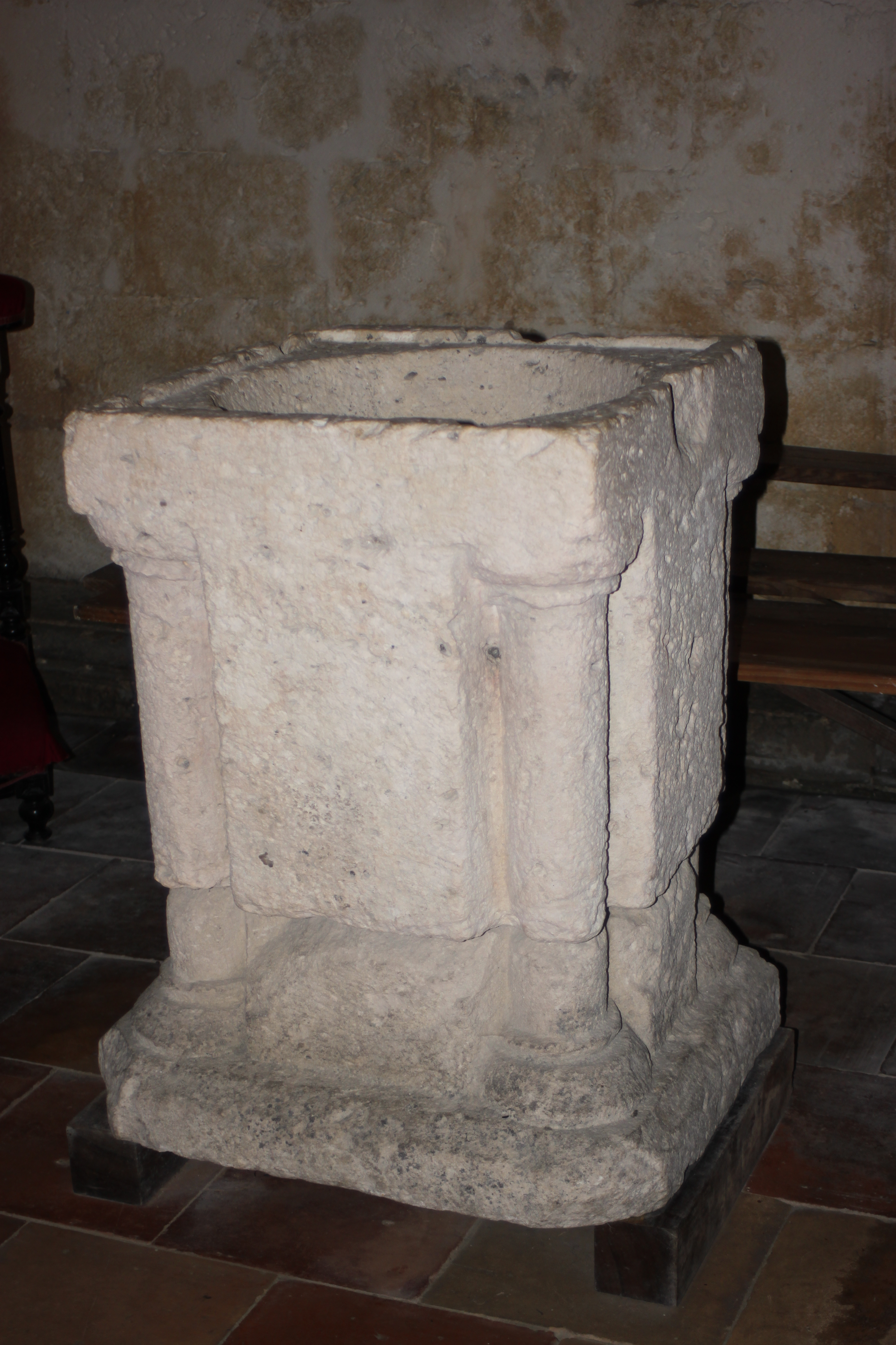 Fonts baptismaux, église Saint-Pierre, Fr-17-Mornac-sur-Seudre.